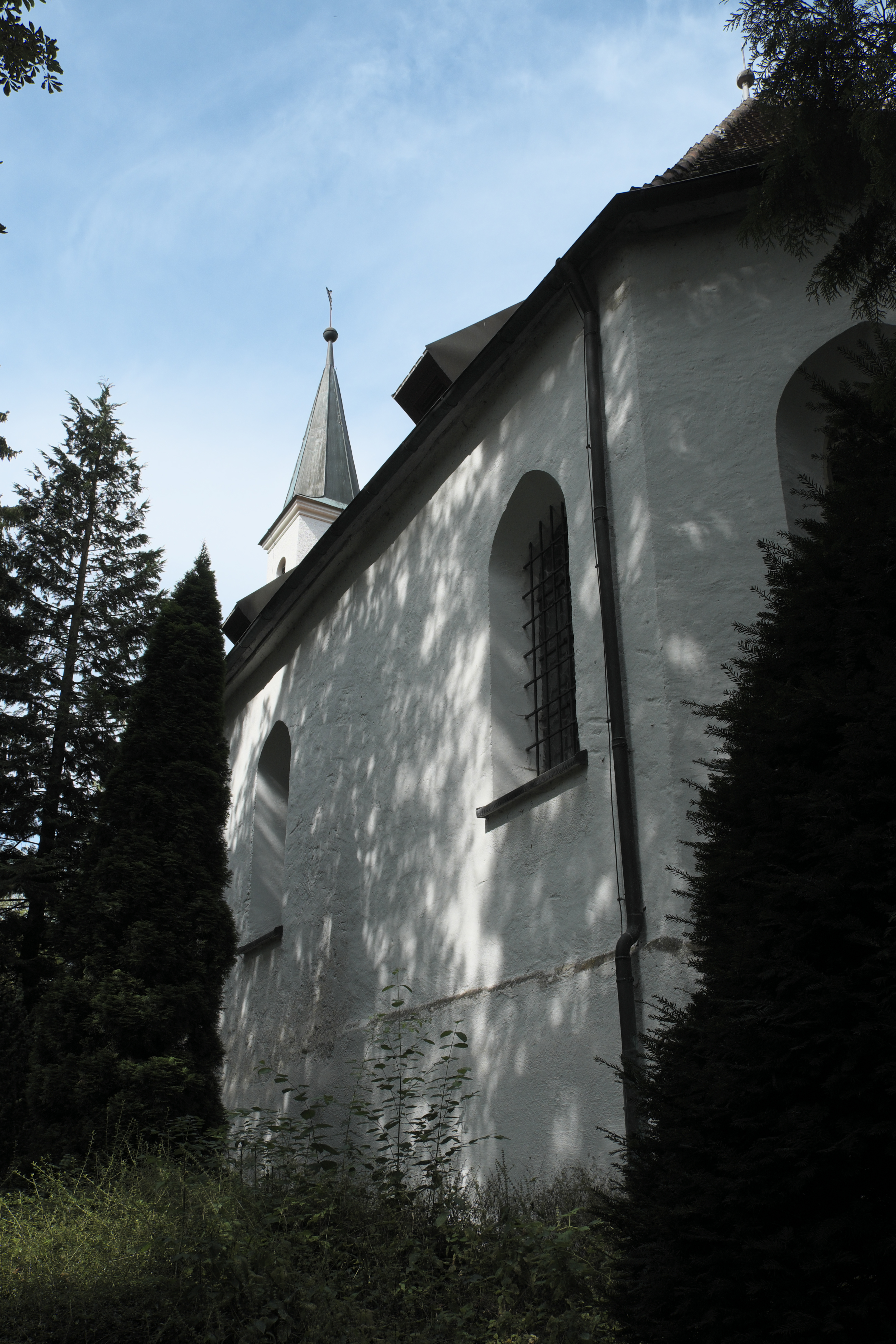 Katholische Filialkirche St. Stephan in Mörlbach, einem Ortsteil von Berg (Starnberger See), im Landkreis Starnberg (Bayern/Deutschland)